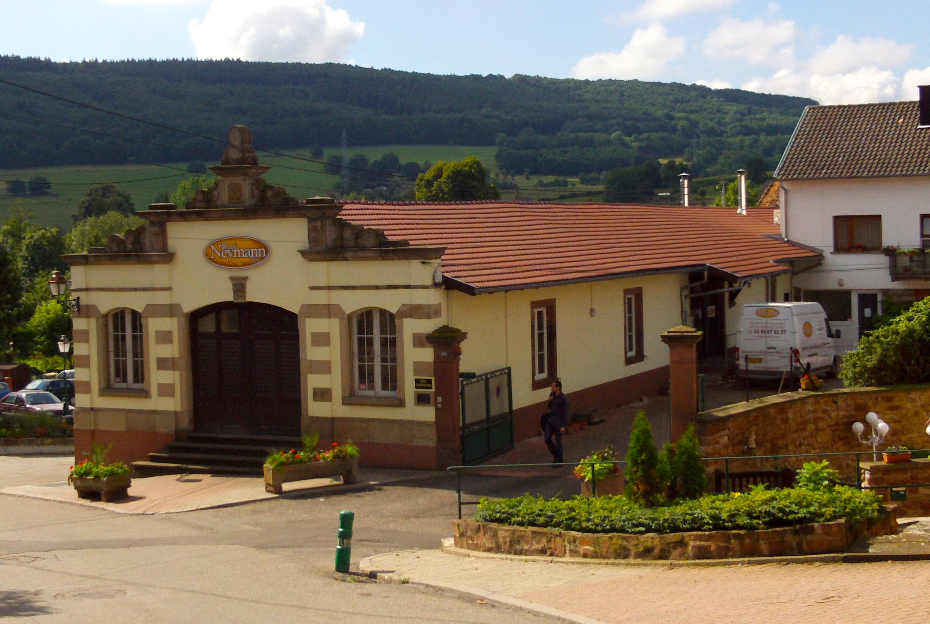 Wasselonne l’usine René Neymann, 2011.